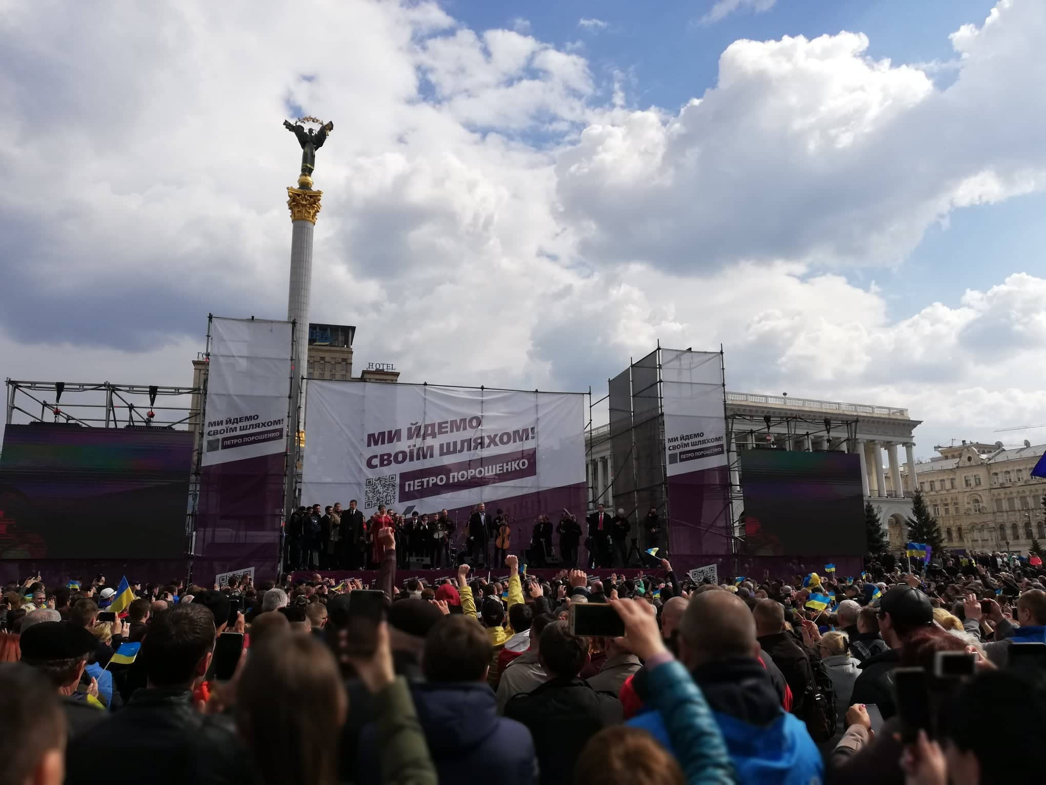 Мария и Петр Порошенко, Парубий, Ада Роговцева, и другие